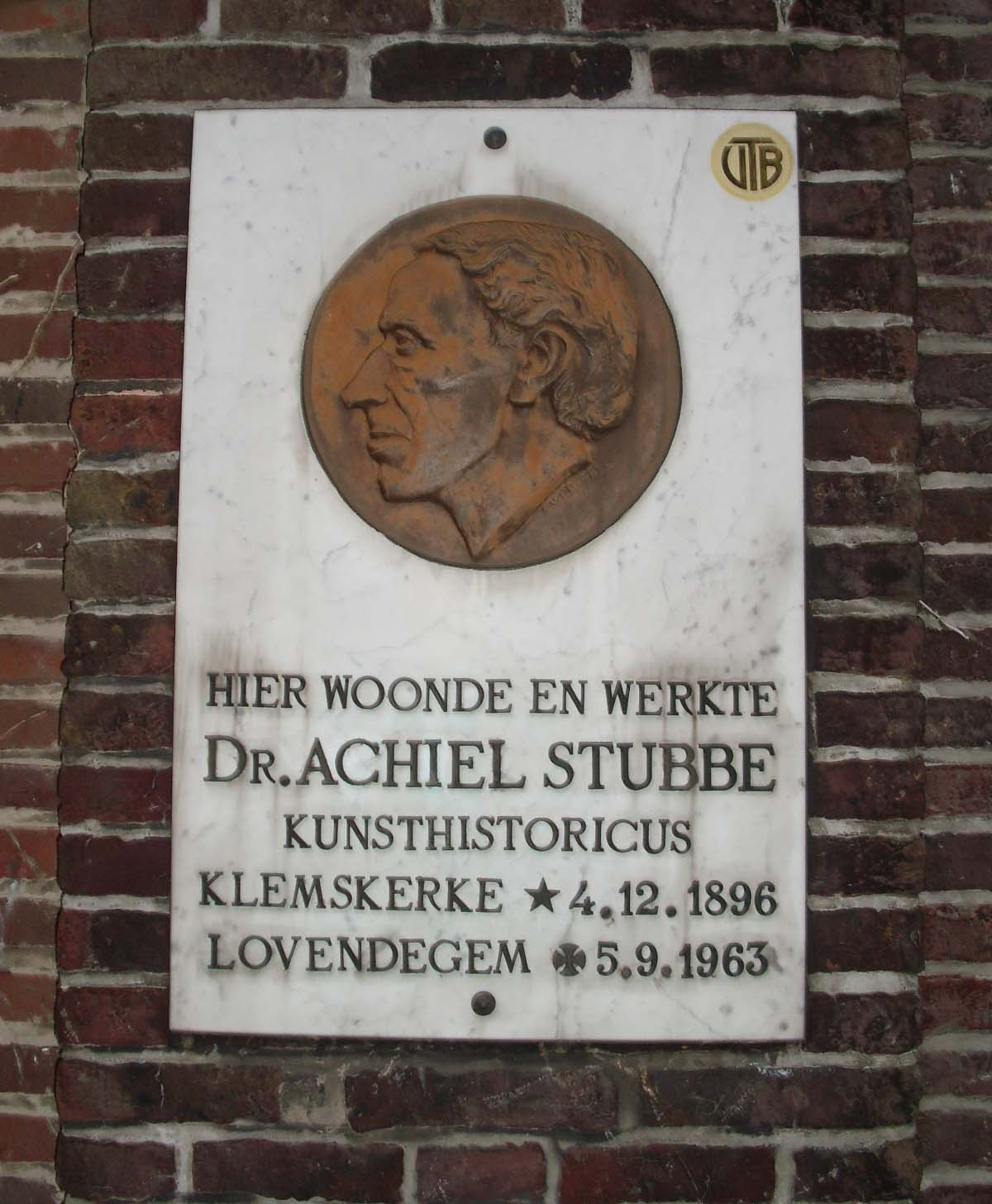 Plakket - De Triangel - Molendreef - Lovendegem - Oost-Vlaanderen - Vlaanderen - België